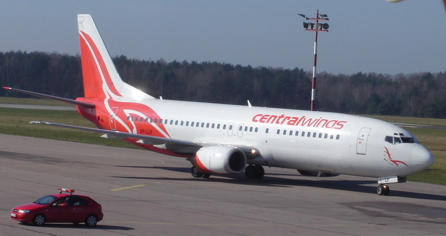 Boeing 737 400 SP-LFF on the Szczecin Goleniów airport